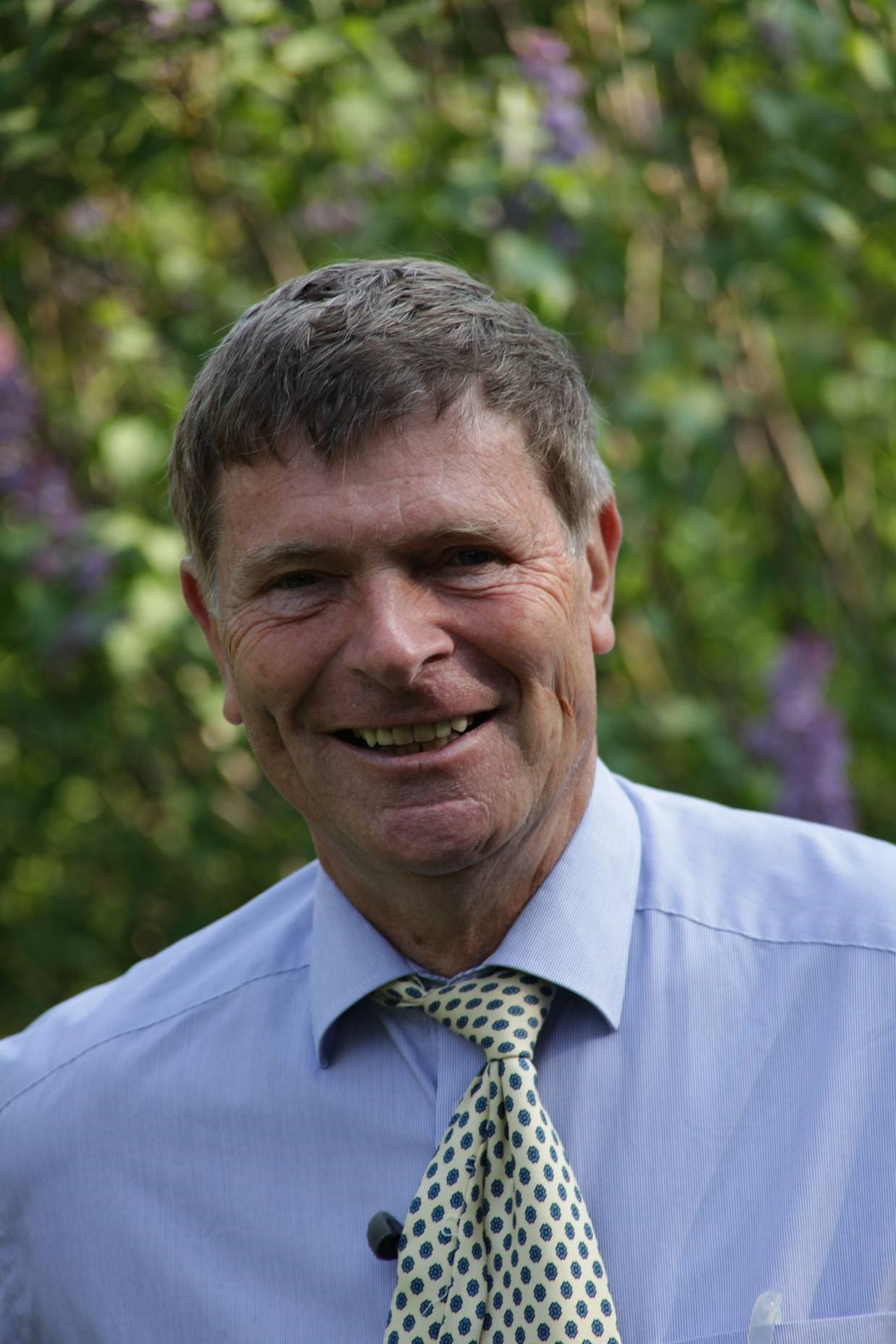 Fotografie von Hans-Werner Springorum.